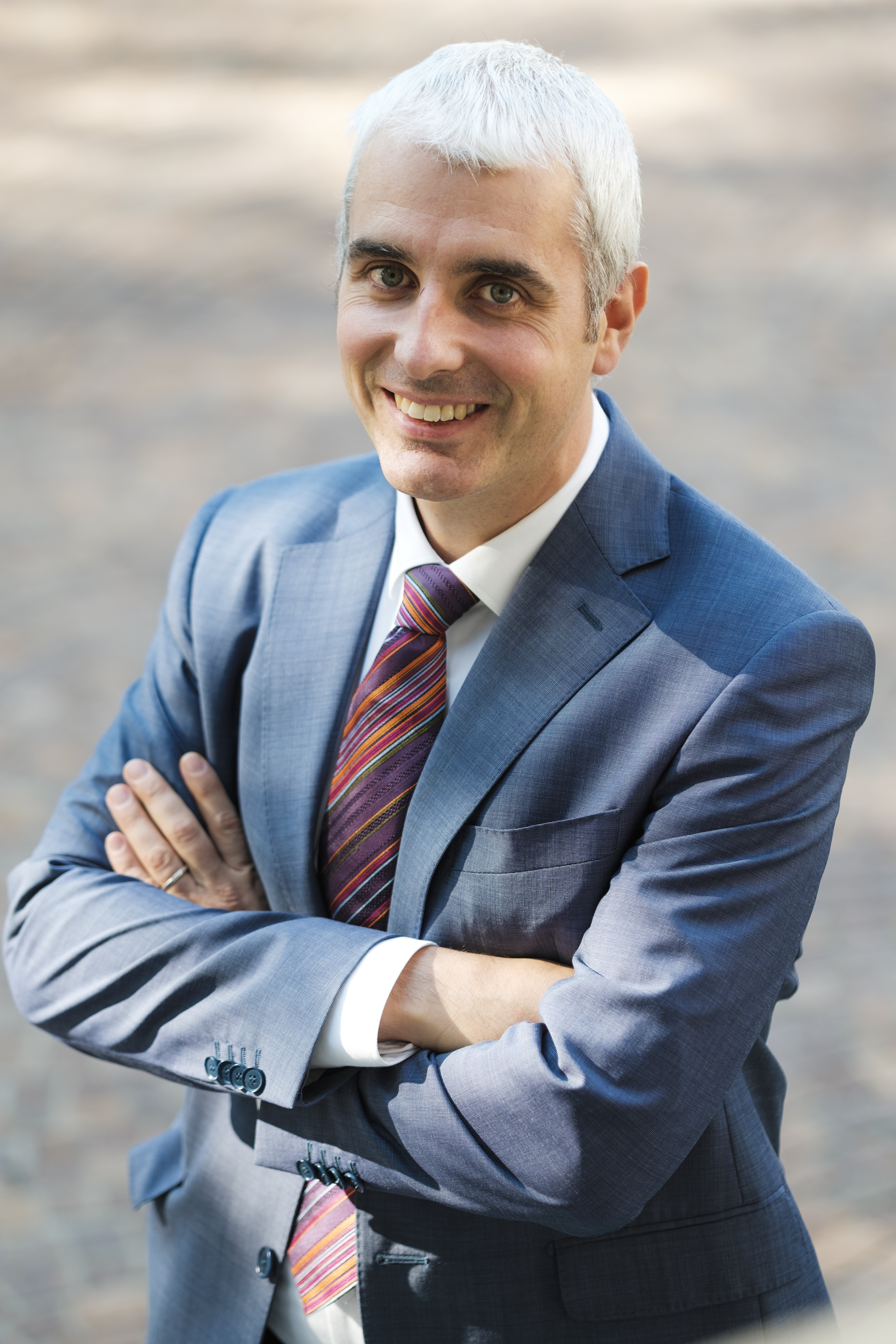 Alberto Anfossi, Segretario Generale Compagnia di San Paolo